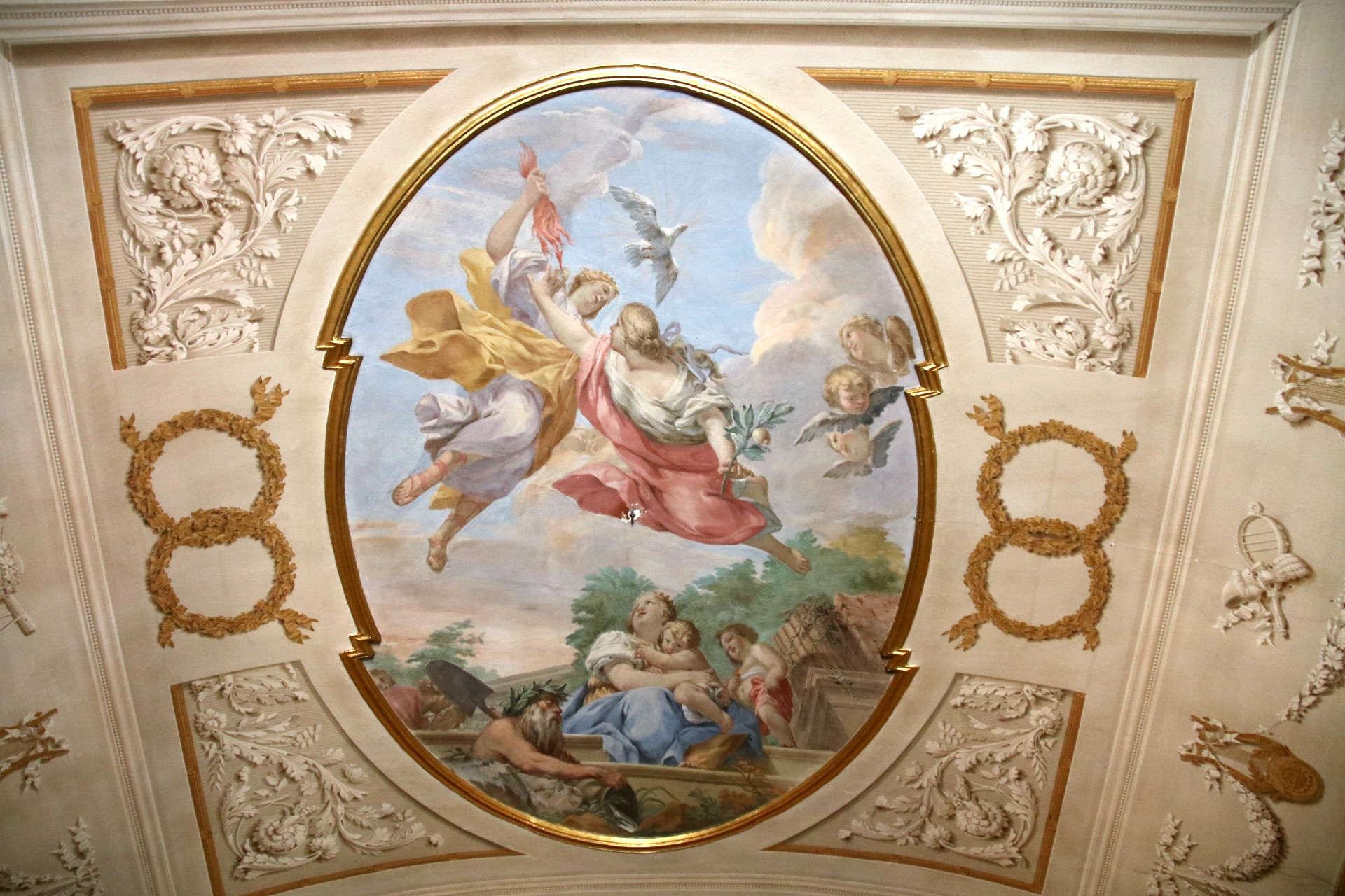 Palazzo Quaratesi (Pisa)